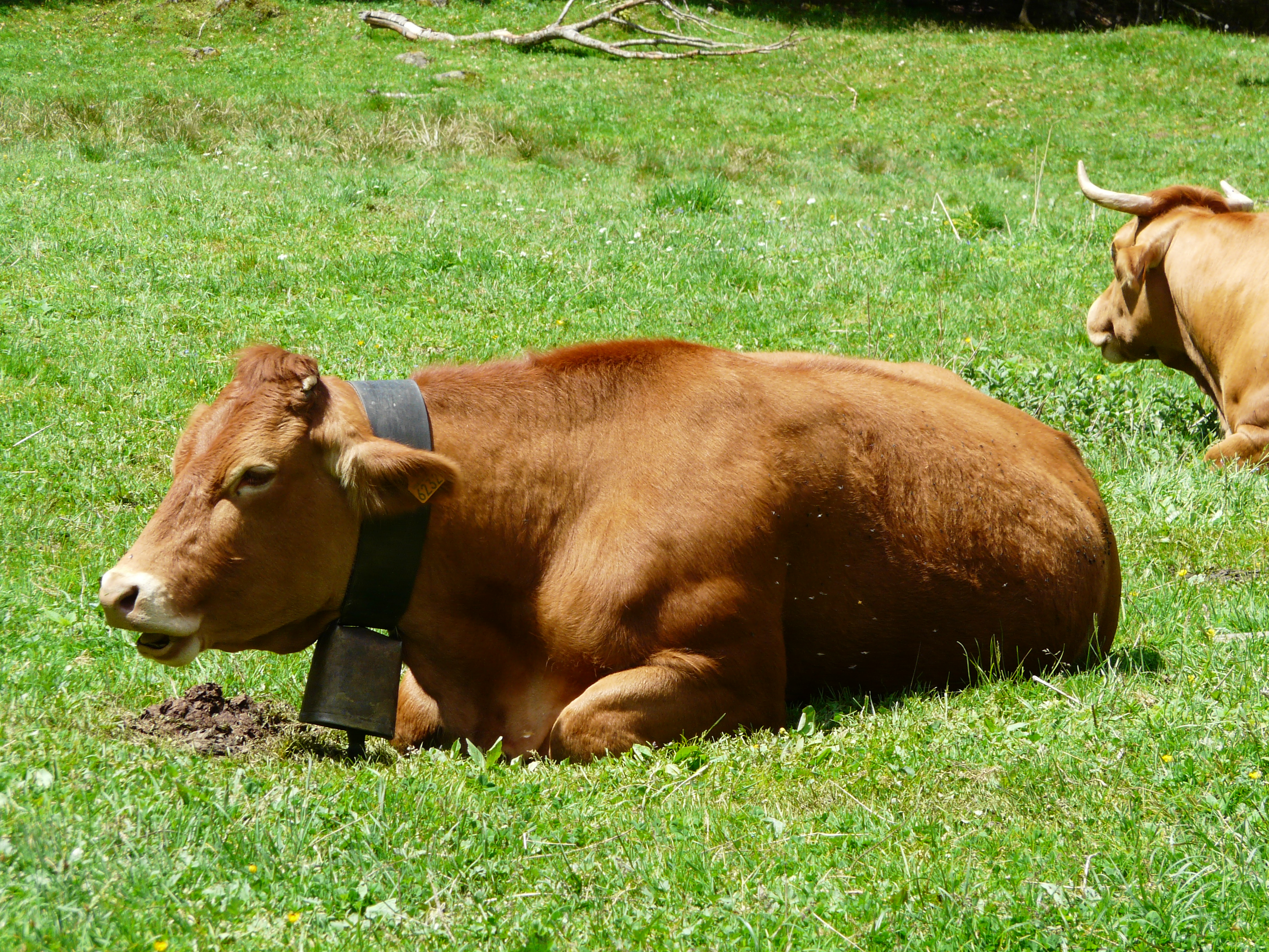 Vache de race limousine, Haute-Garonne, France.